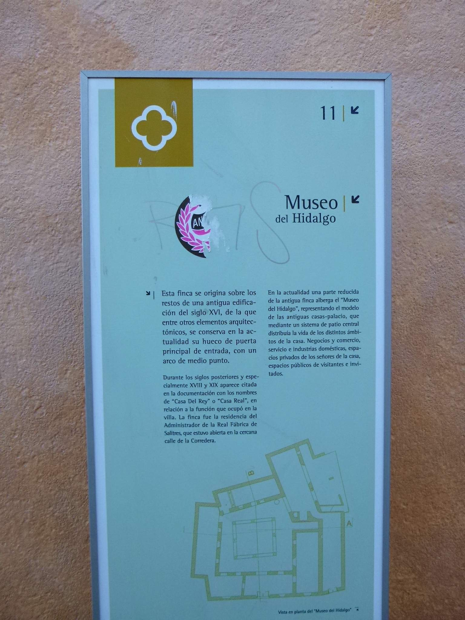 Museo Casa del Hidalgo (Alcázar de San Juan)